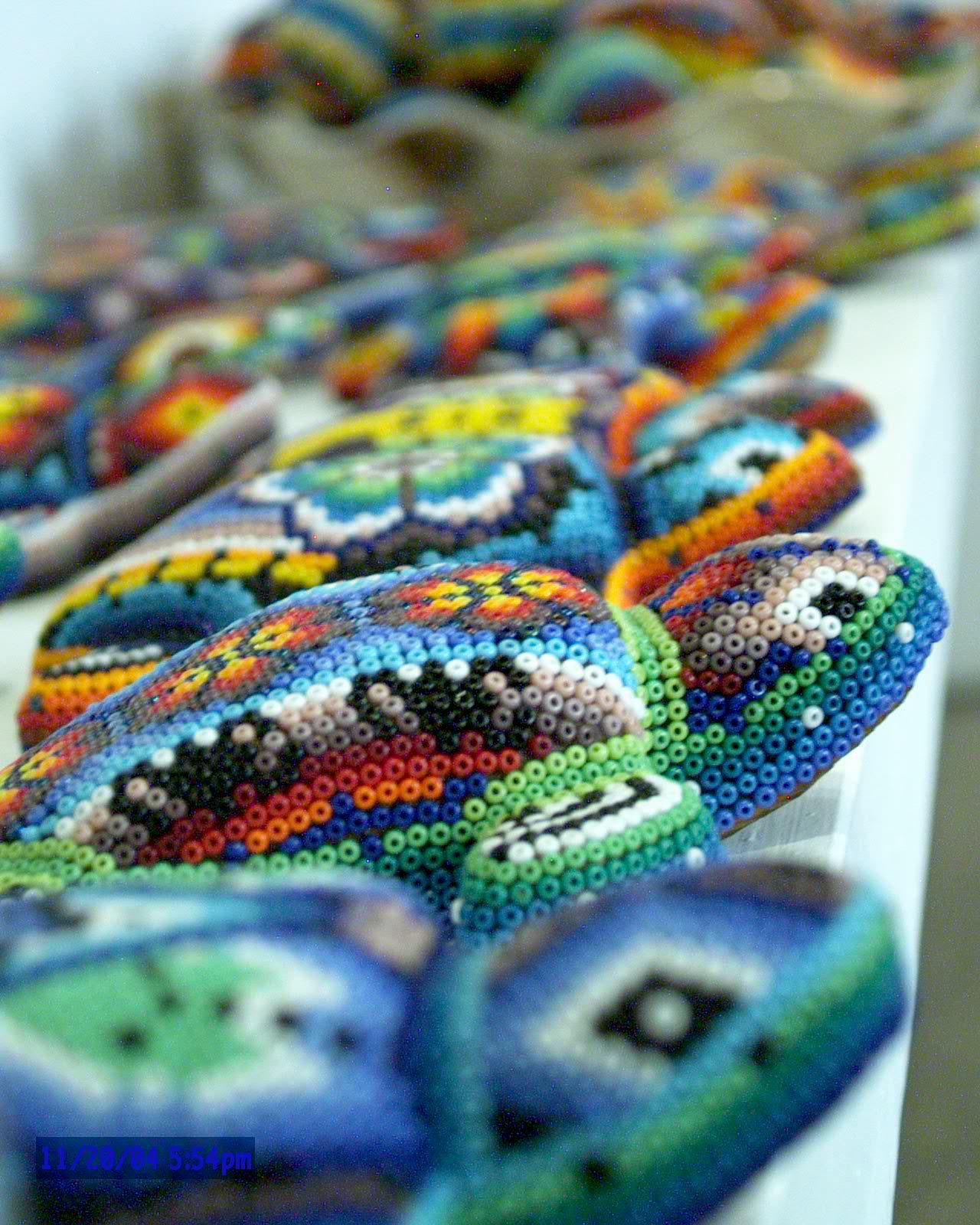 Huichol Trabajando, 20 Dic 2004 by Mario Jareda Beivide, Fotografias de Mexico